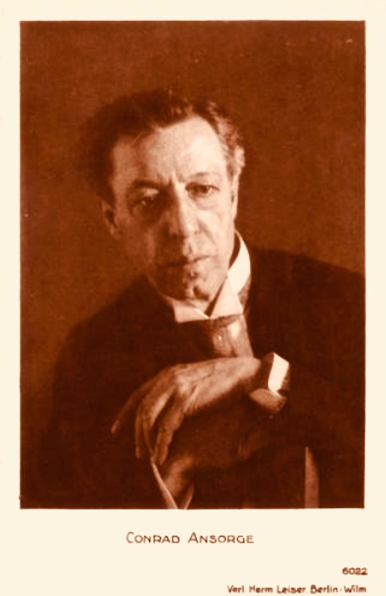 Conrad Ansorge (1862–1930), Pianist, Komponist und Musikpädagoge